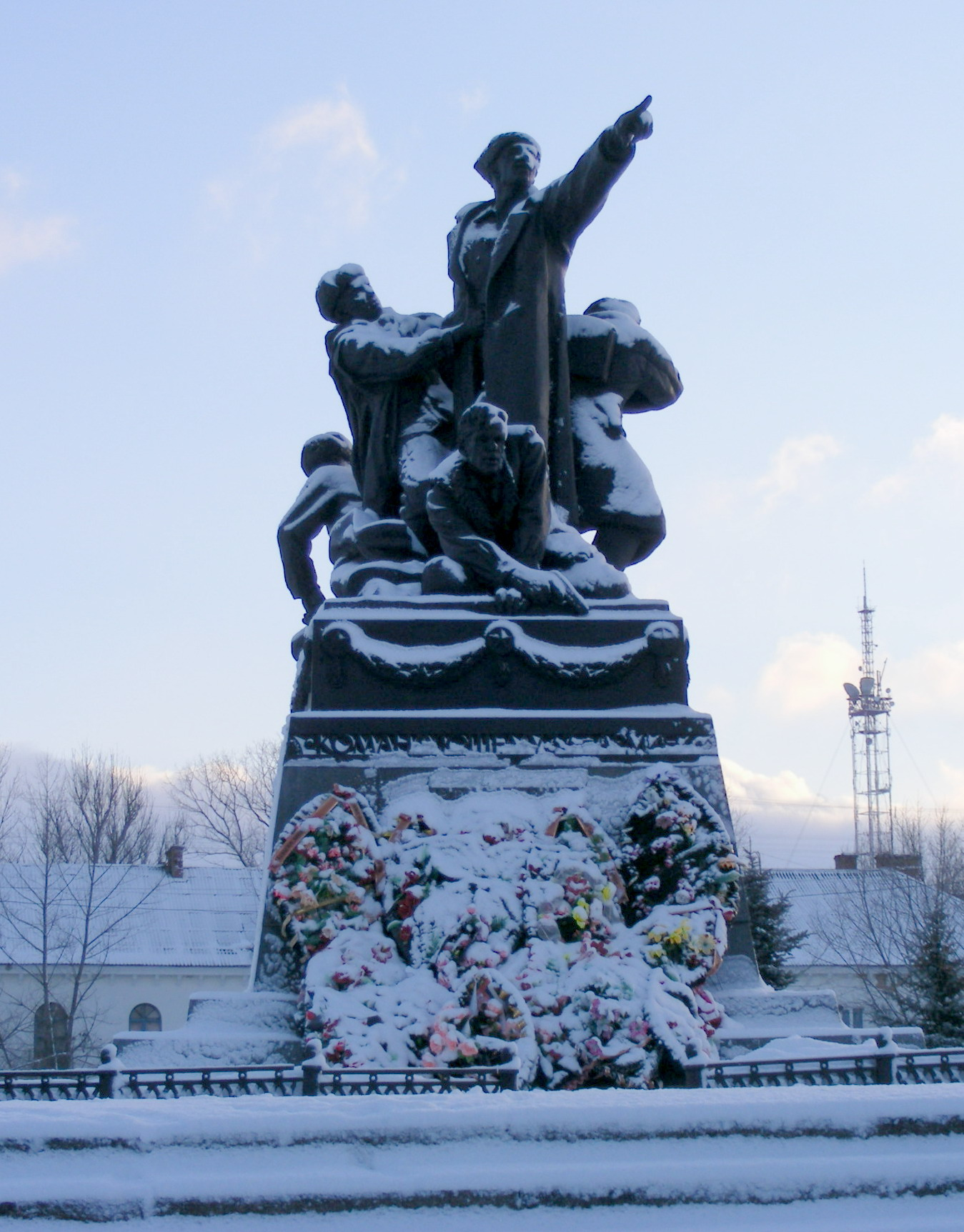 A monument to general Yefremov. Vyazma, Russia.